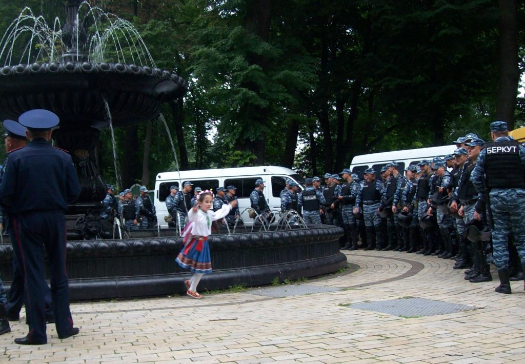 укр.мова: Фото з Маріїнського парку під час народних протестів щодо мовного законопроекту.